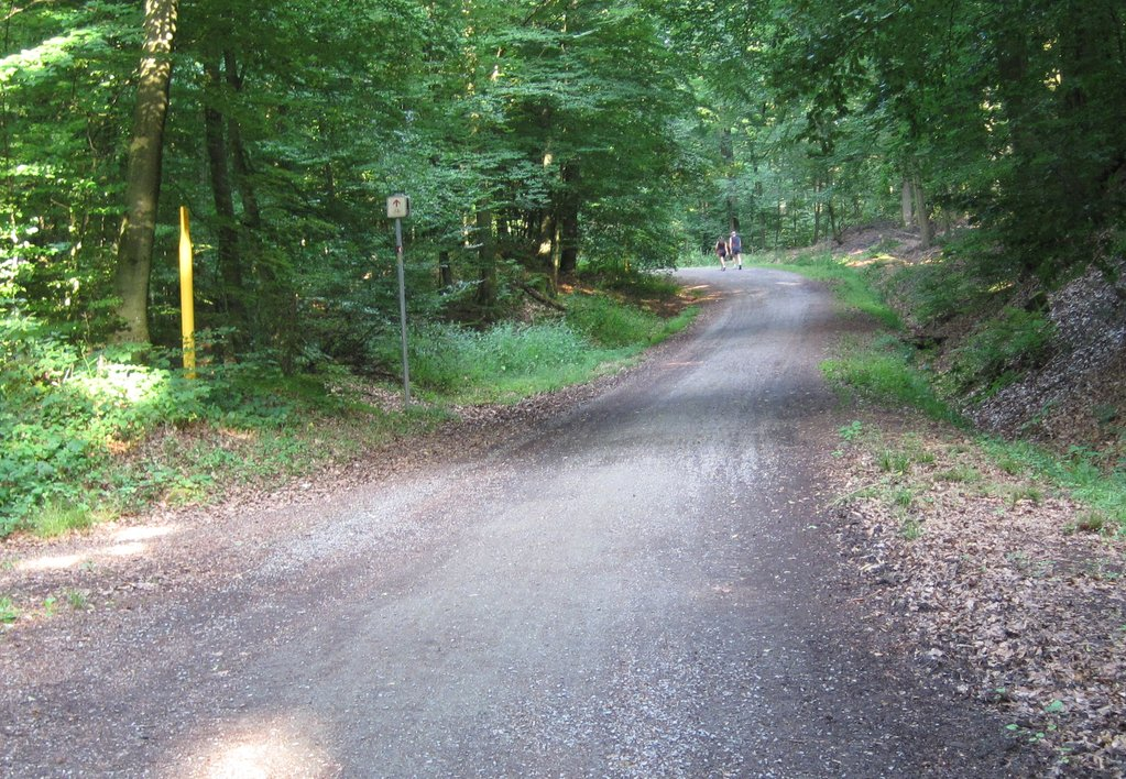 Brüderstraße im Königsforst östlich der L288